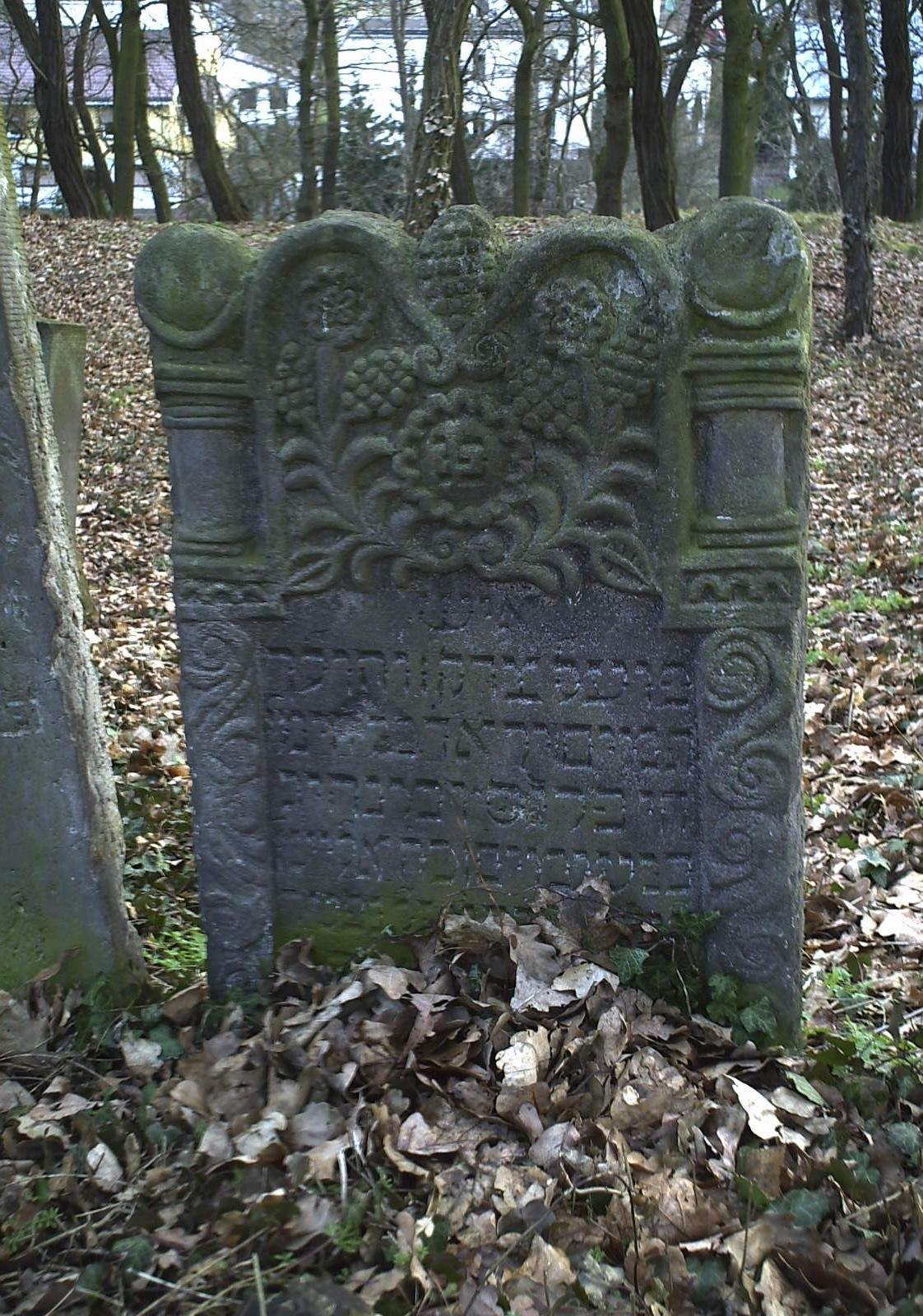 Najstarsza macewa (z 1736 r.) z cmentarza żydowskiego w Skwierzynie (woj. lubuskie).